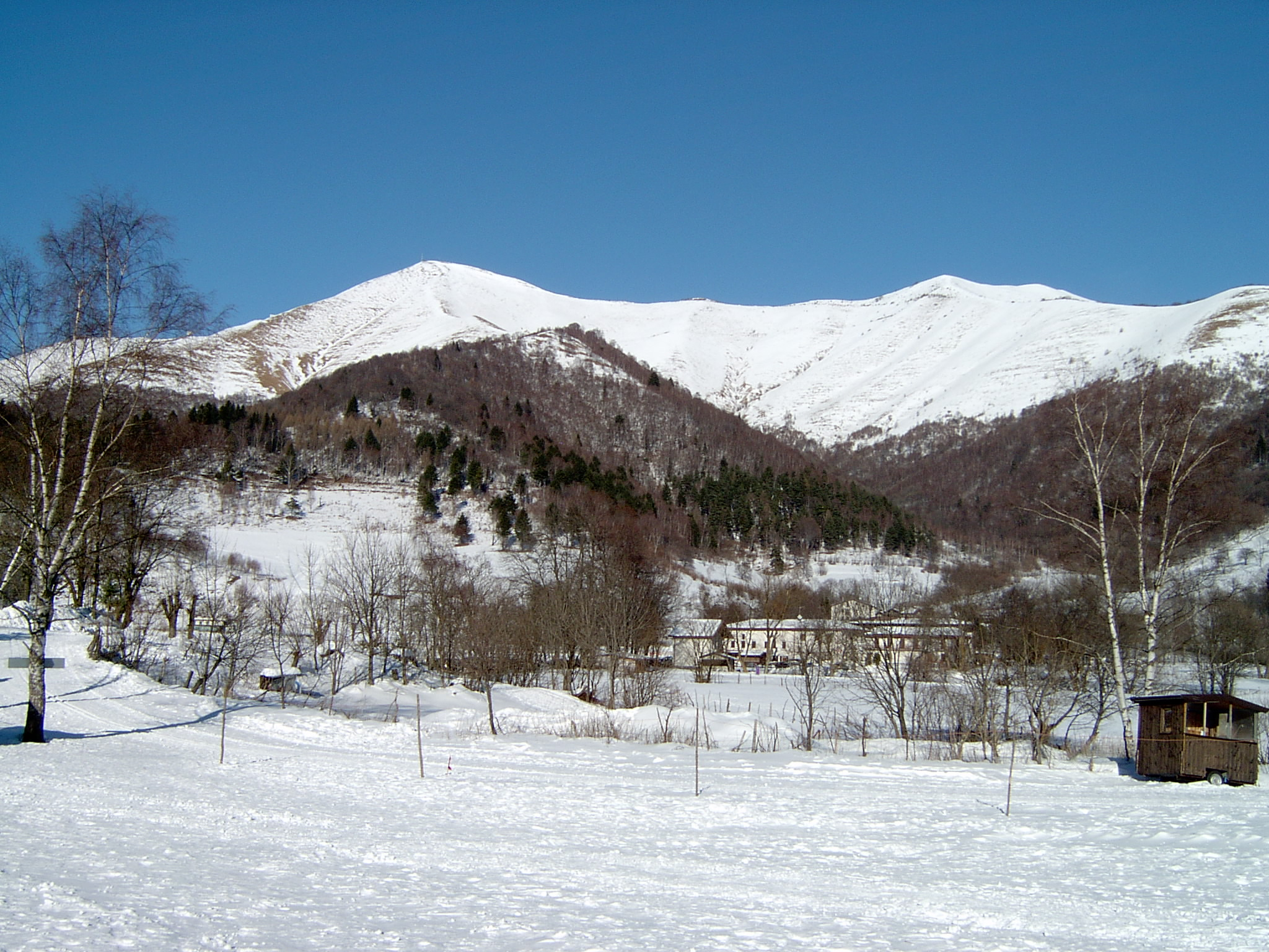 Il Monte San Primo visto dal Pian del Tivano Foto mia